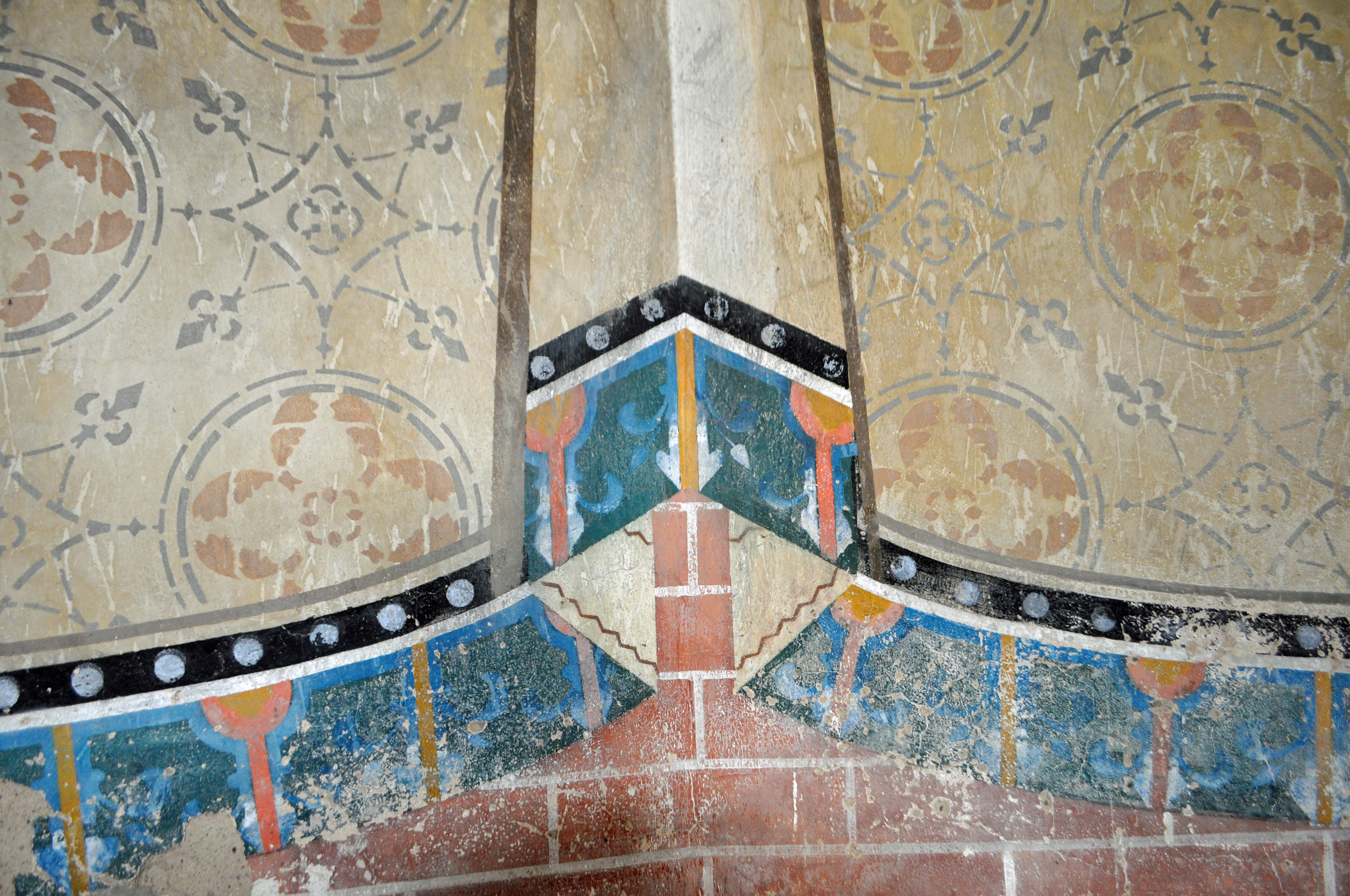 siehe Dateiname! Wandmalerei im Chor